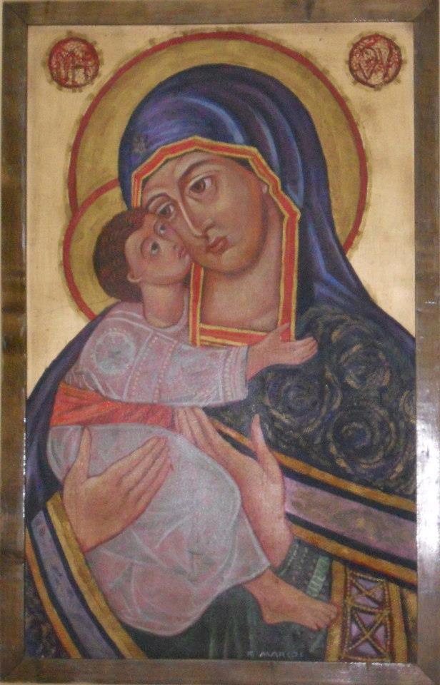 Theotokos iglesia ortodoxa